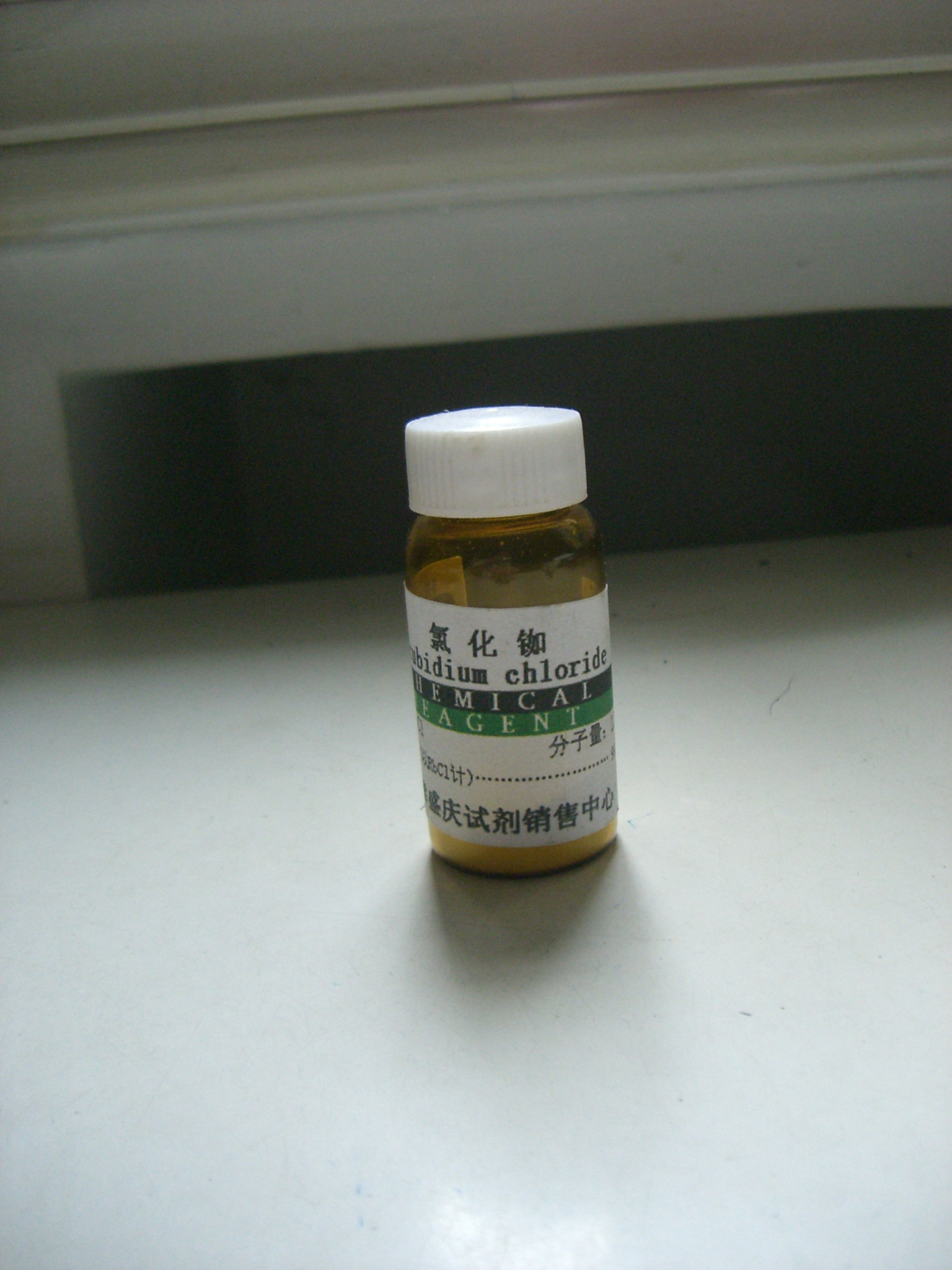 Rubidium chloride